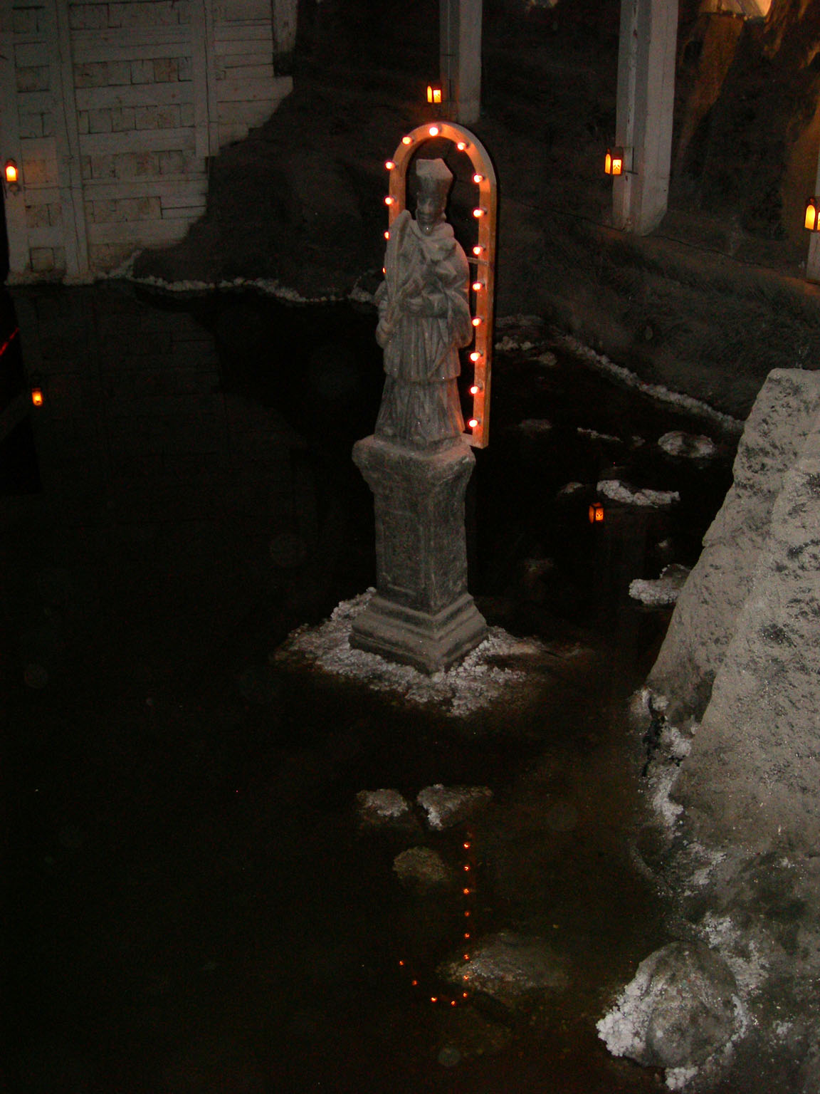 Rzeźba przedstawiająca św. Jana Nepomucena (patrona tonących) w komorze im. Józefa Piłsudskiego w kopalni soli w Wieliczce.